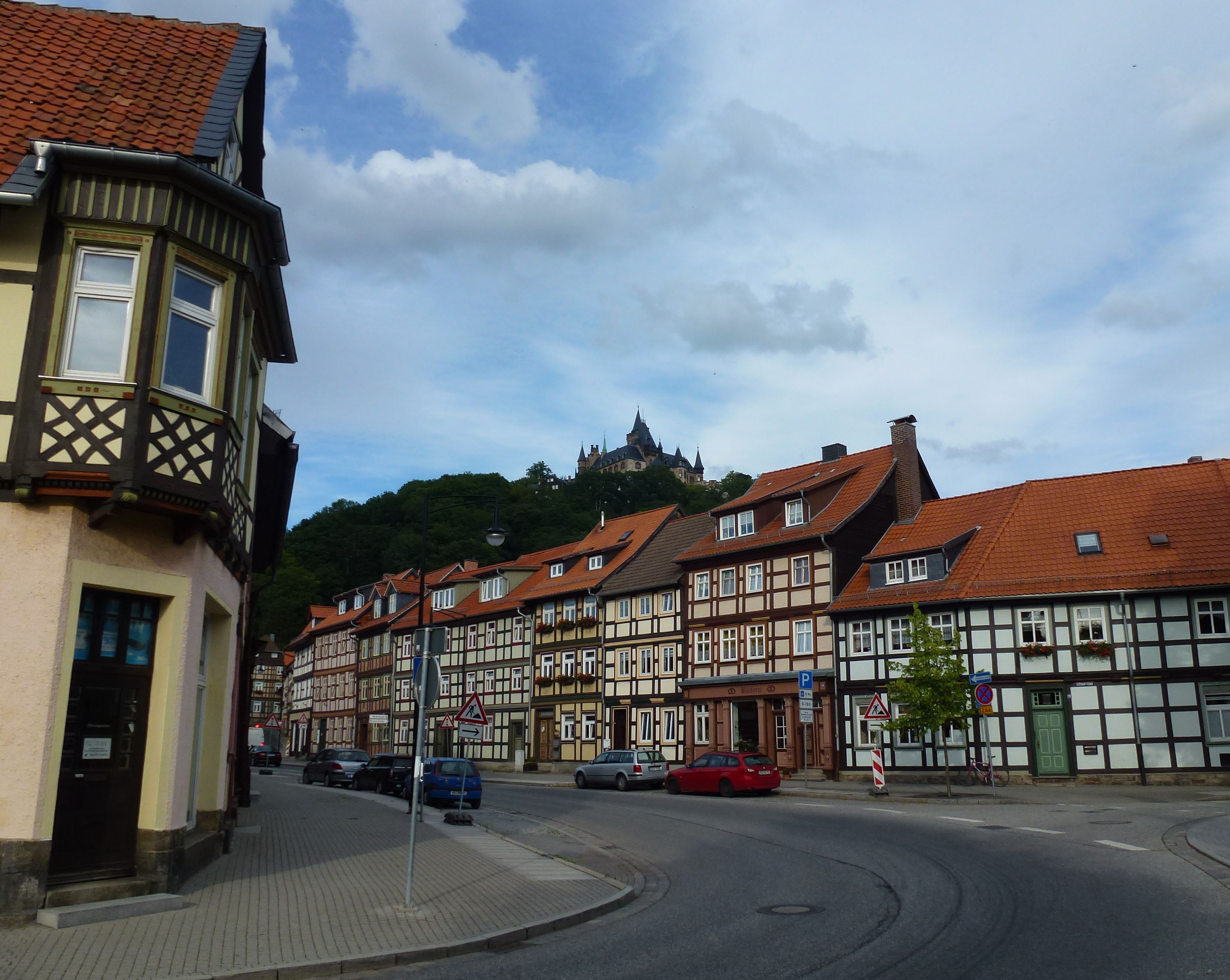 Schloßblick von der Schönen Ecke in Wernigerode, sehr häufiges Postkartenmotiv.